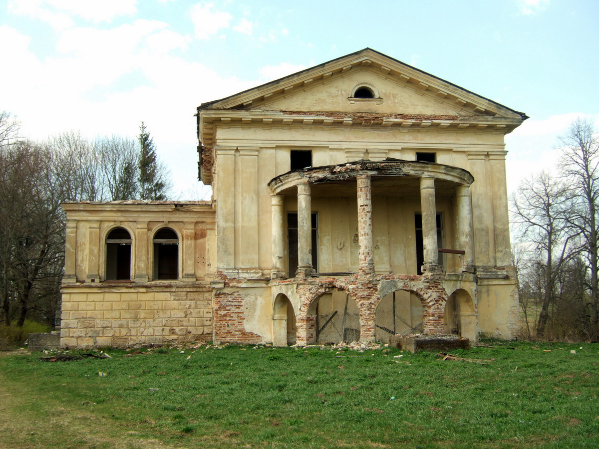 Raudondvario (Nemenčinė) rūmai